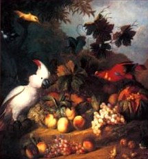 autor fotografie neznámy, digitalizácia zo starých prospektov